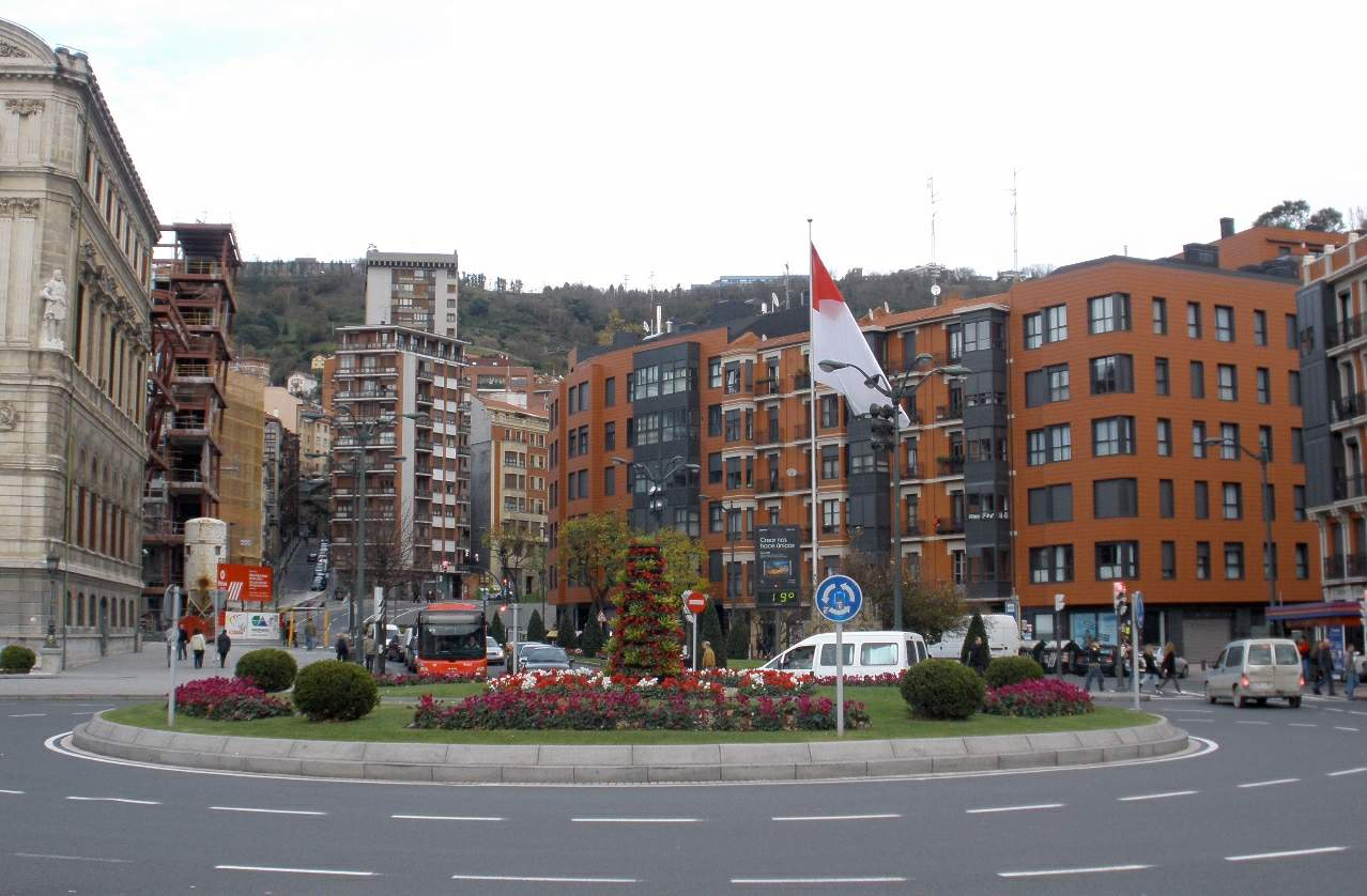 Plaza Ernesto Erkoreka (Bilbao)